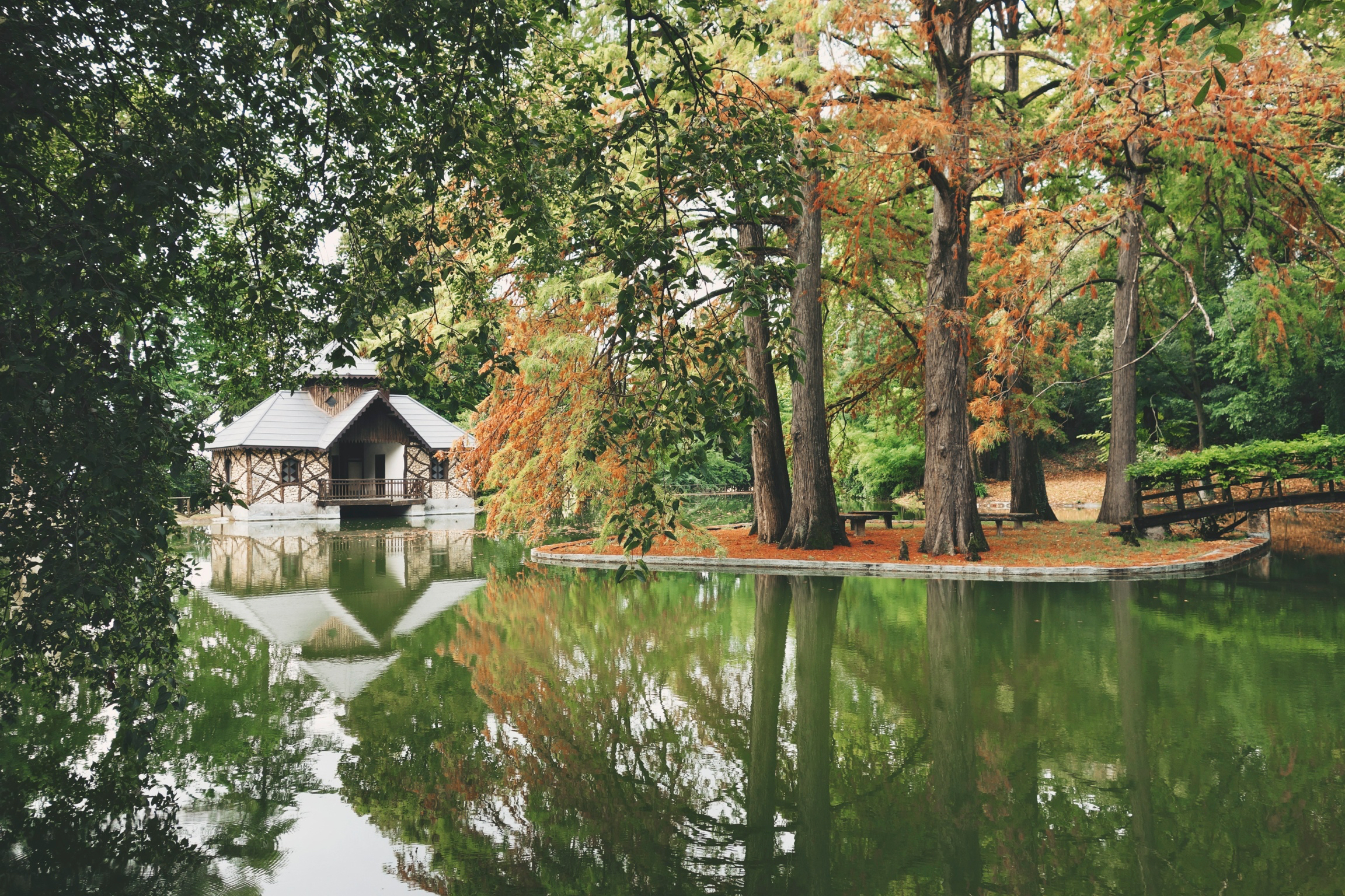 Parco romantico in stile inglese presso Villa Mosconi Bertani Negrar Verona Italia